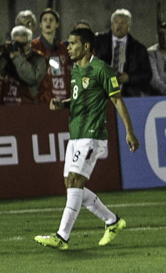 1 Fernando Muslera 22 Martín Cáceres 2 José María Giménez 3 Diego Godín C 13 Gastón Silva 4 Federico Valverde 15 Matías Vecino Falero 6 Rodrigo Bentancur 10 Giorgian De Arrascaeta 9 Luis Suárez 21 Edinson Cavani DT Óscar Tabárez Suplentes: 12 Martín Campaña 23 Esteban Conde 19 Sebastián Coates 16 Maxi Pereira 17 Egidio Arévalo Ríos 20 Alvaro González 5 Carlos Sánchez 7 Cristian Rodríguez 14 Nicolás Lodeiro 8 Jonathan Urretaviscaya 11 Christian Stuani 18 Maximiliano Gómez Camera: Canon EOS 5D Mark II 0 ISO: 1000